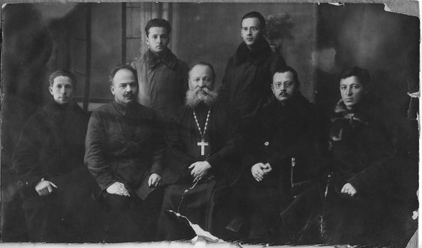 Слева-направо: Пётр Иакинфович Былинский, Иван Петрович Былинский, ? Иакинфович Былинский, Иакинф Петрович Былинский, Анатолий Орестович Масюк, Константин Иакинфович Былинский, Георгий Иакинфович Былинский